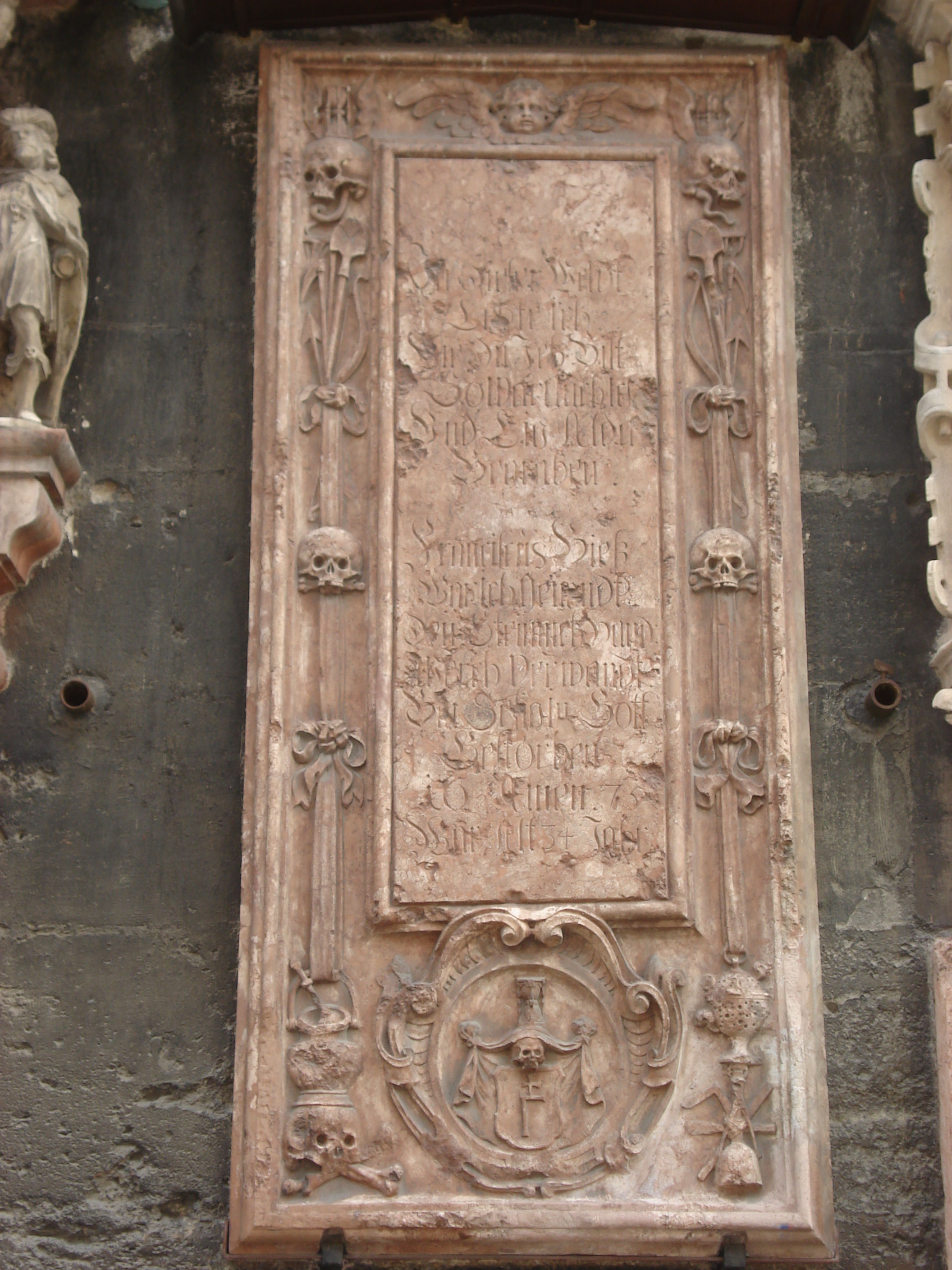 St._Stephan_Epitaph-Hieß